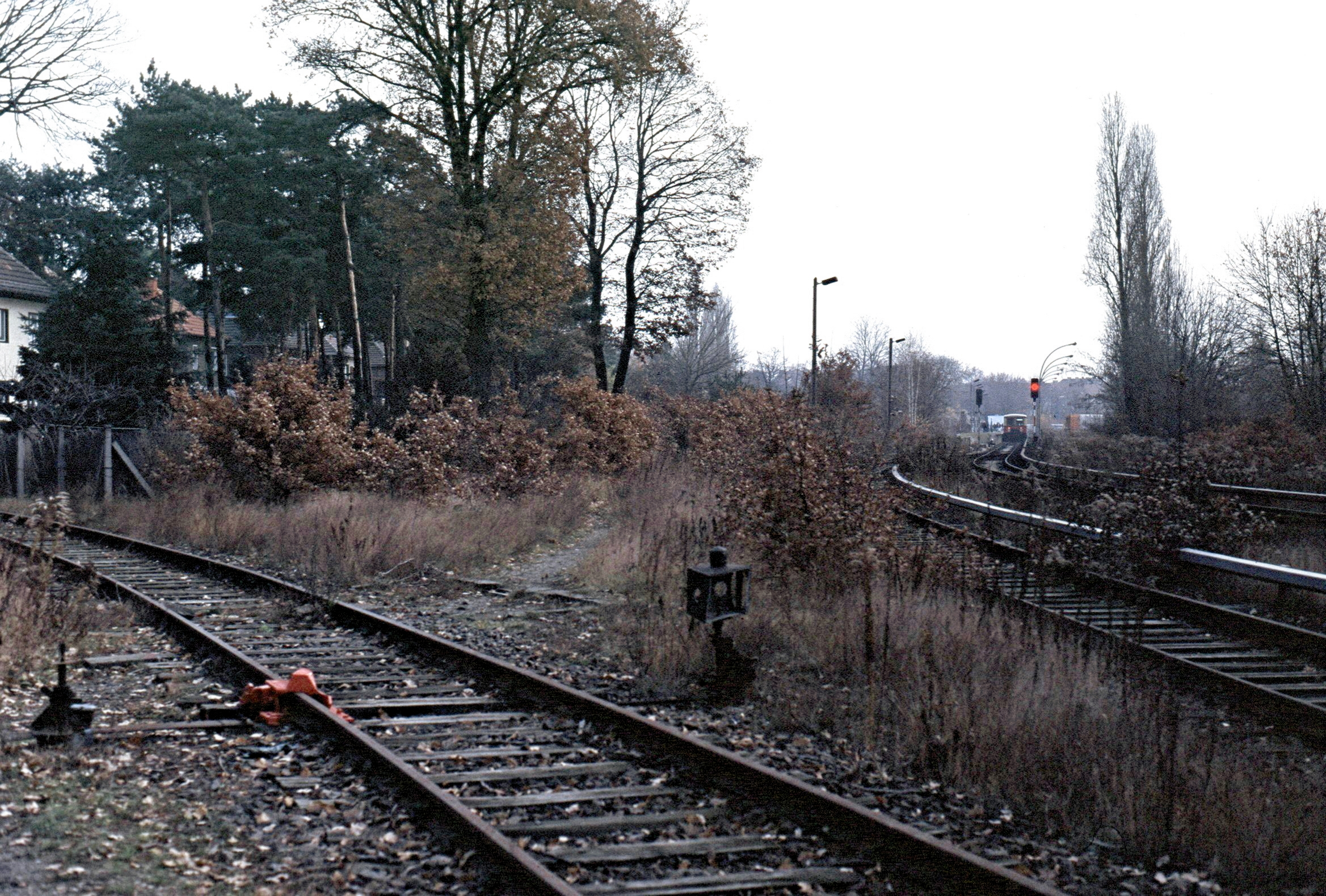 Abzweig Werk Spindler Berlin Spindlersfeld